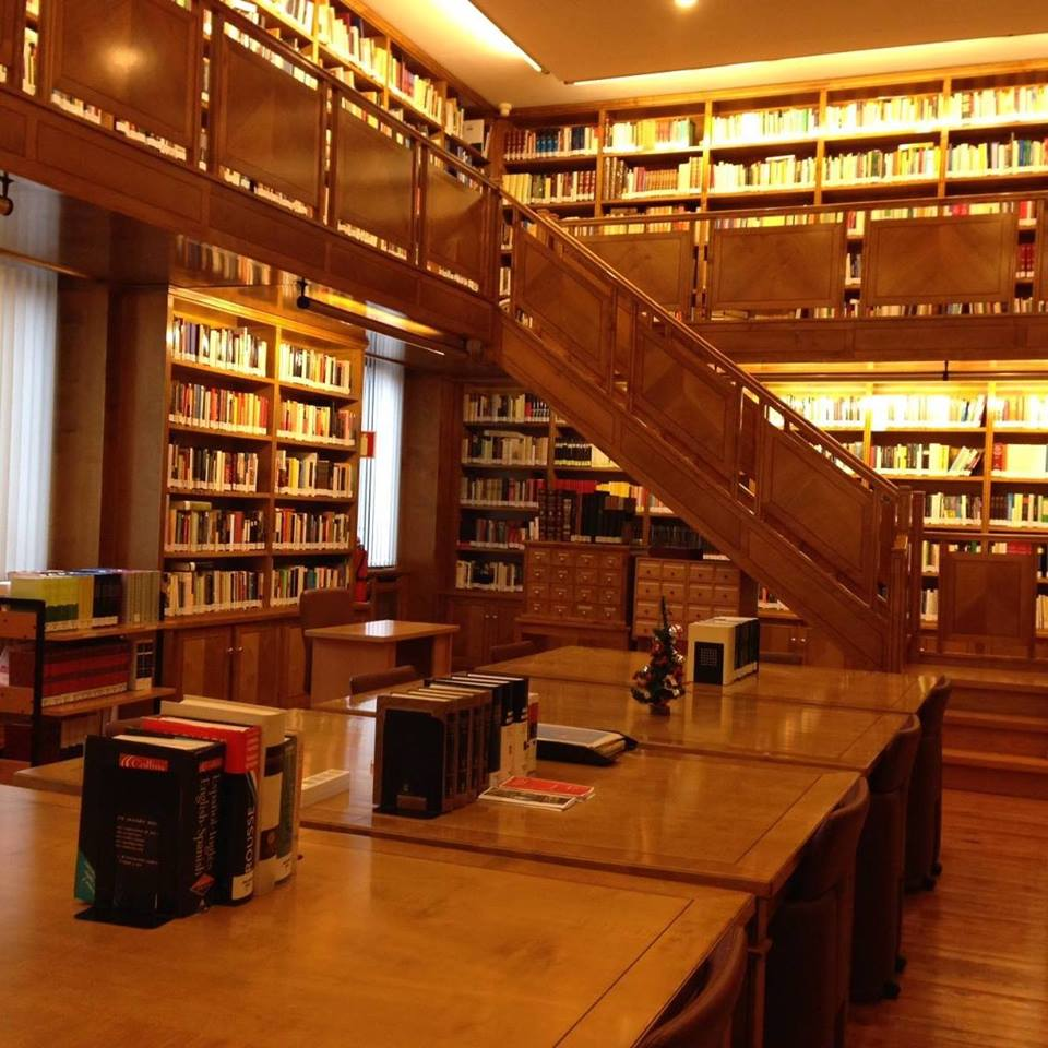 Sala de Lectura de la Biblioteca. Palacio de la Junta General